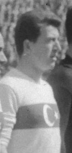 Naci Erdem